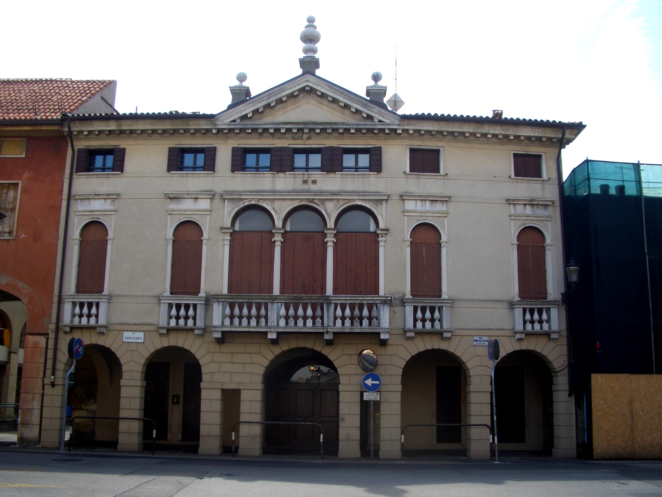 Foto scattata da me a Padova il 23.8.08. Palazzo Bragadin a Padova sito al numero 180 di via Belzoni.